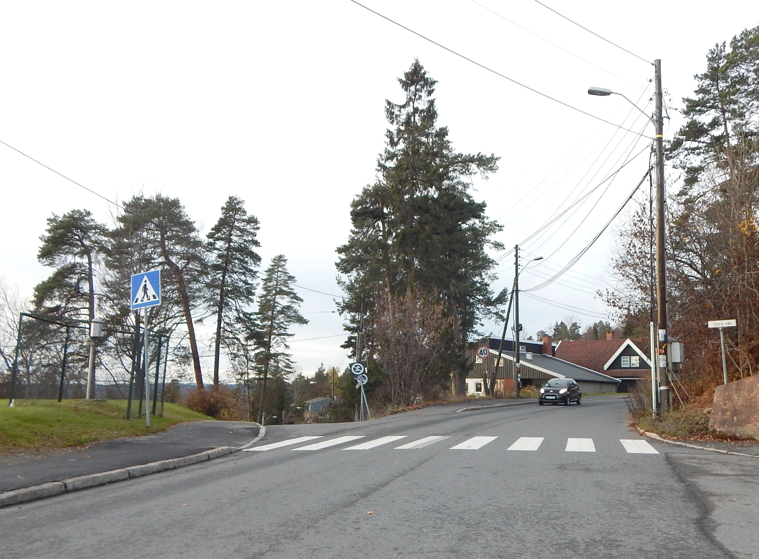 Setra vei sett fra Holmenkollveien